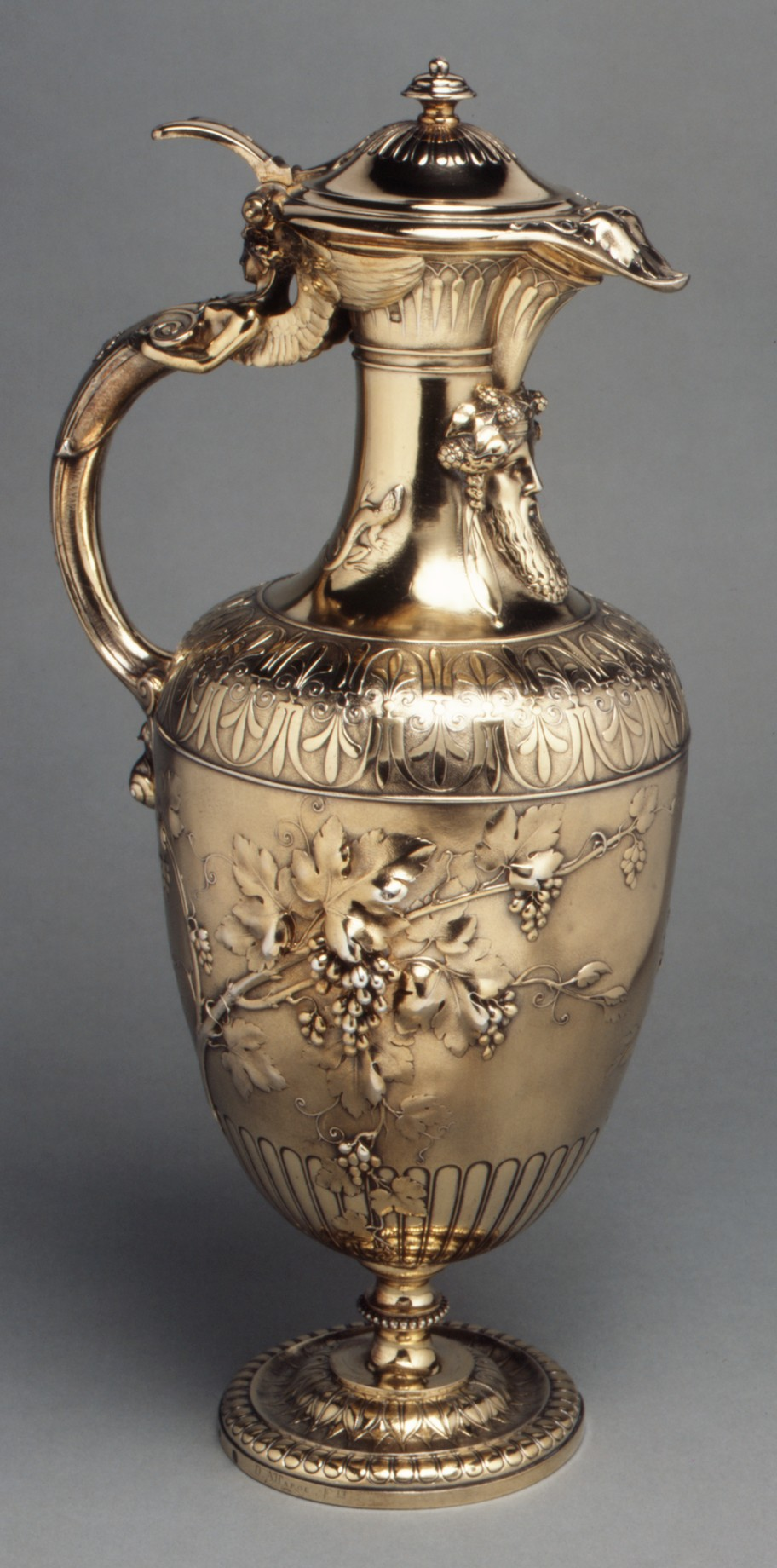 French, Paris; Ewer; Metalwork-Silver